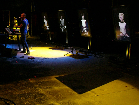 Barcelonese one man band La Casa Azul appearing live in València's bull ring